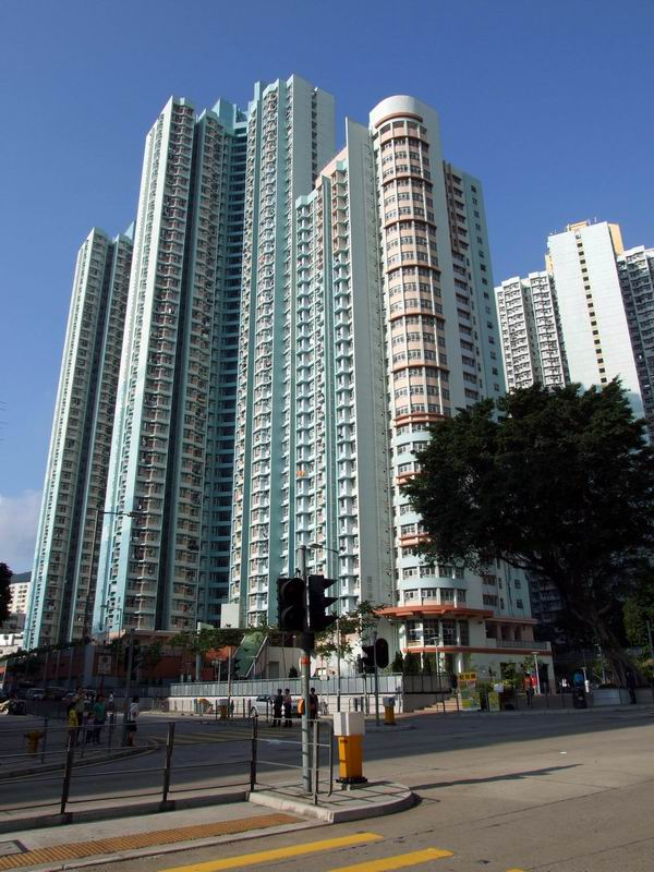 白田邨重建三期